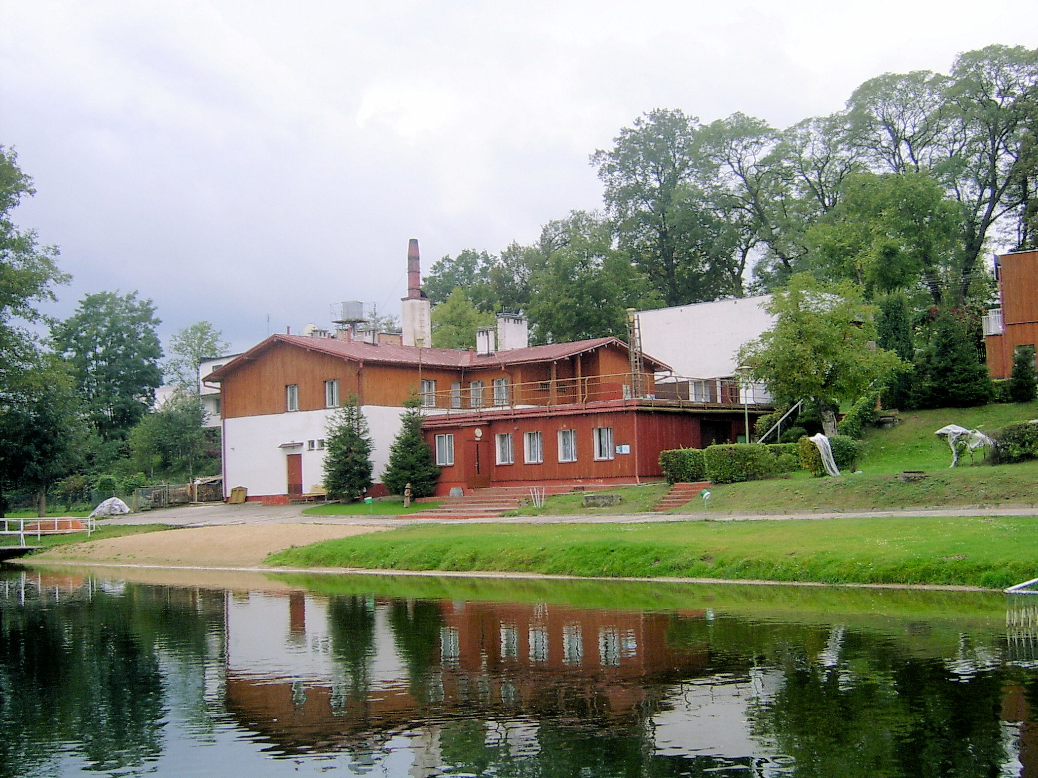 Jezioro Krajnik - Lubniewice.